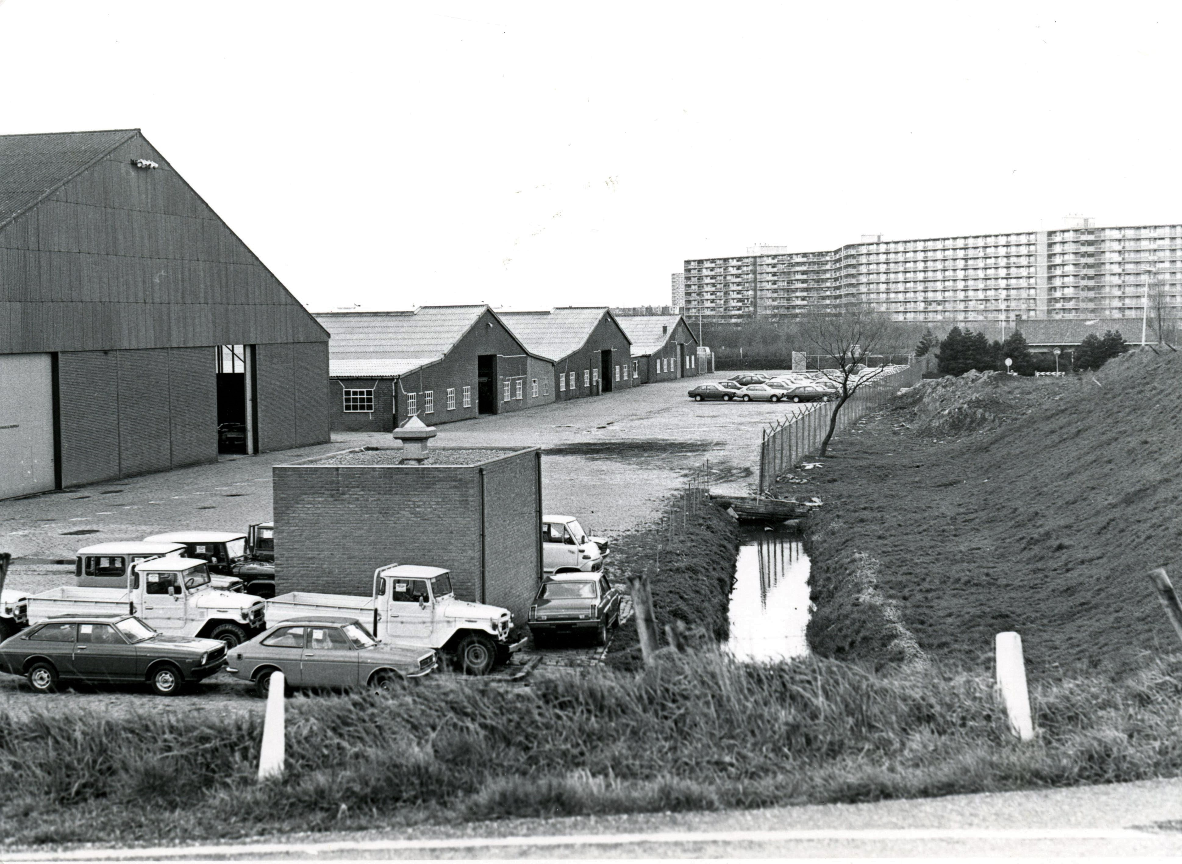 Het terrein van P.L. Baris met loodsen die in gebruik zijn als opslag door Louwman & Parqui, importeur van Toyota. Op de achtergrond de Marrewijkflat en de gesloopte boerderij van Hogenboom. Spijkenisse